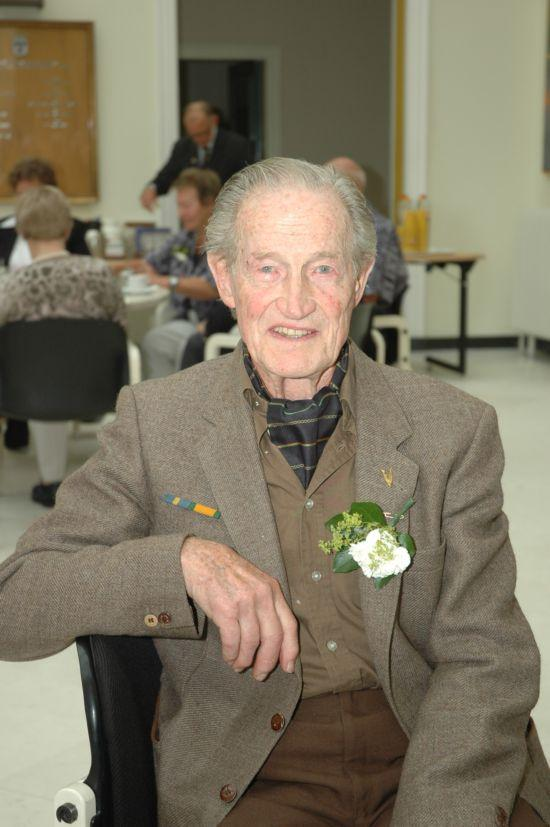 Ed Barton